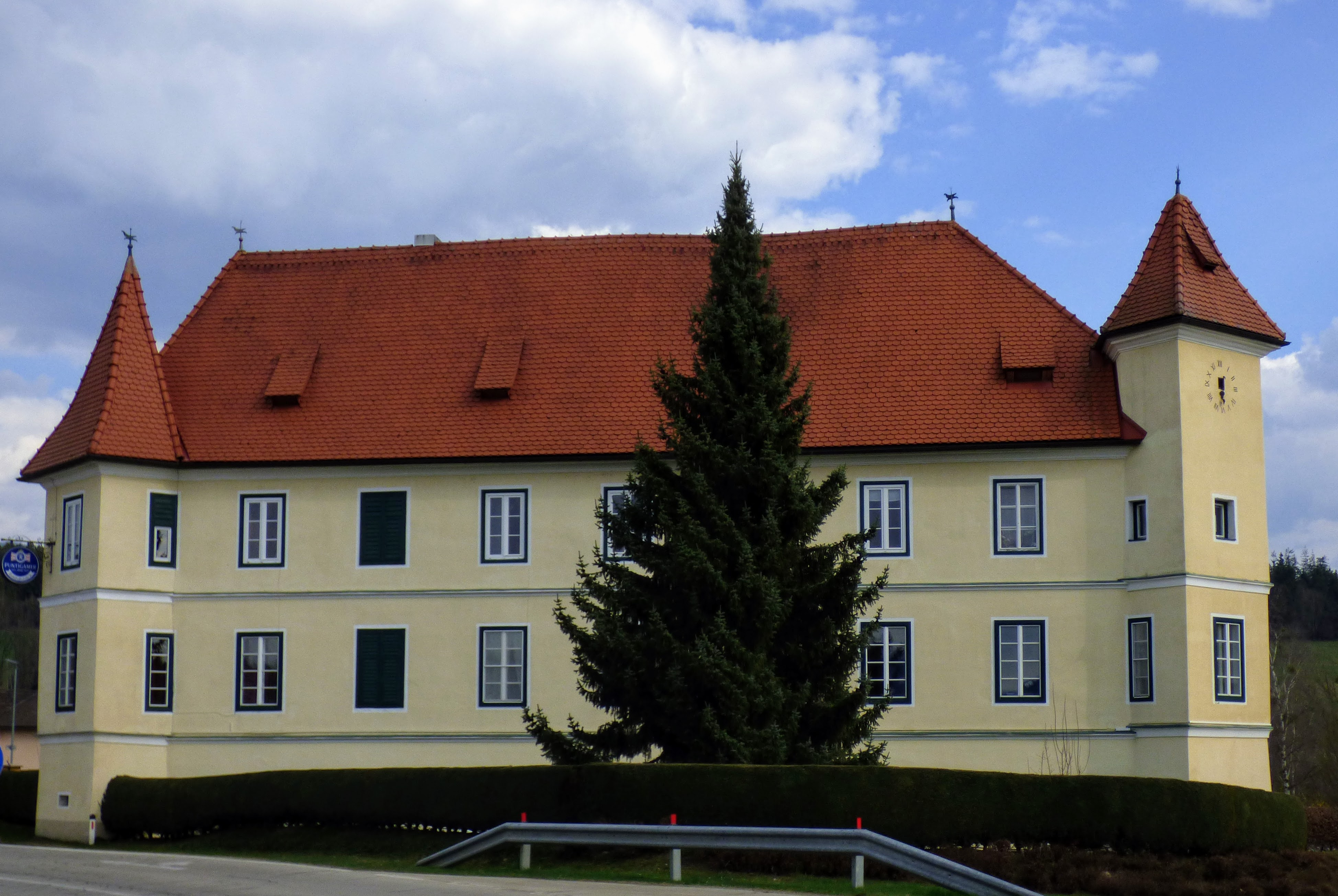 Schloss Silberegg, Gemeinde Kappel am Krappfeld, Kärnten